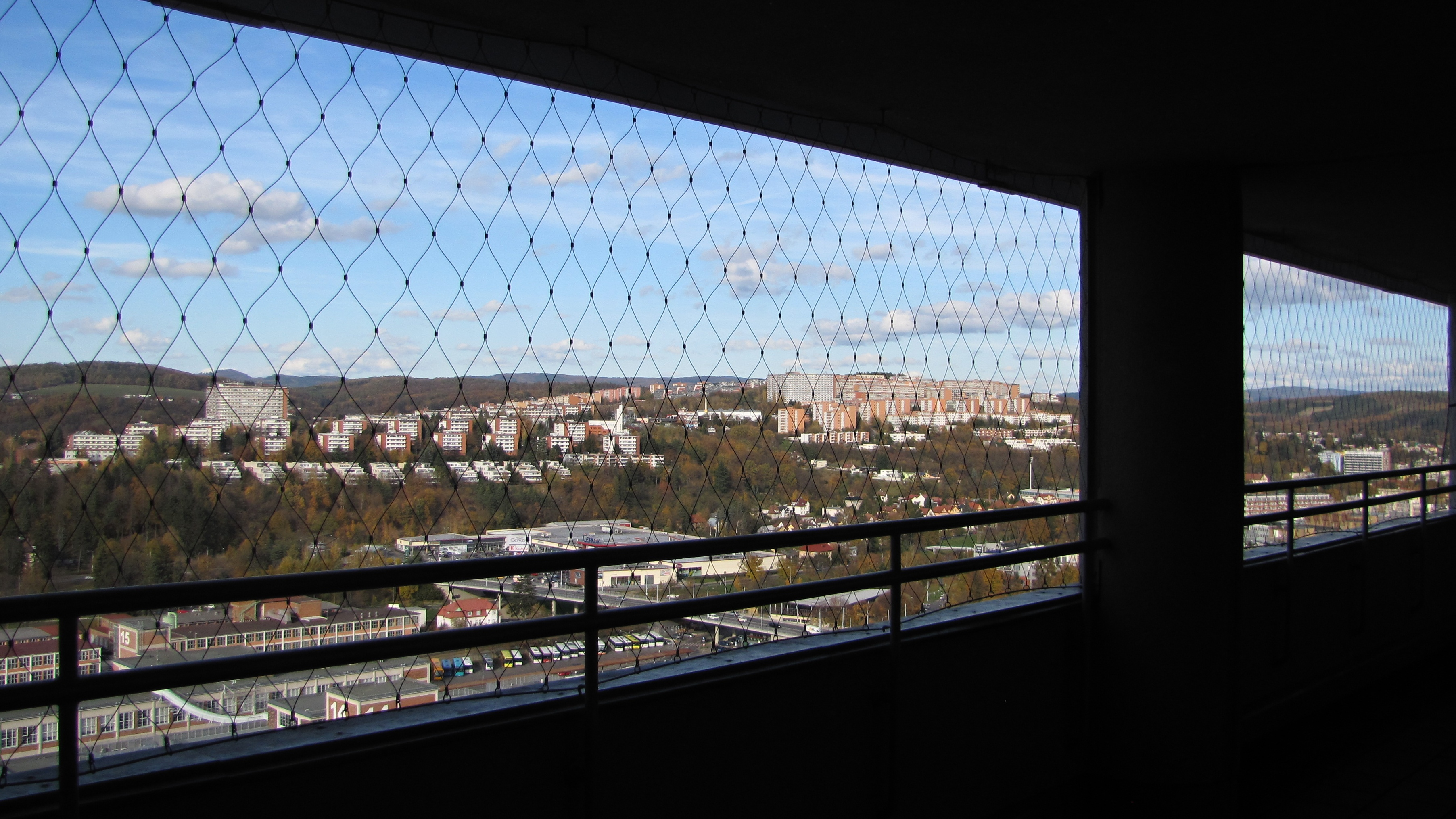 Pohled z Baťova markodrapu na zástavbu v severní části města